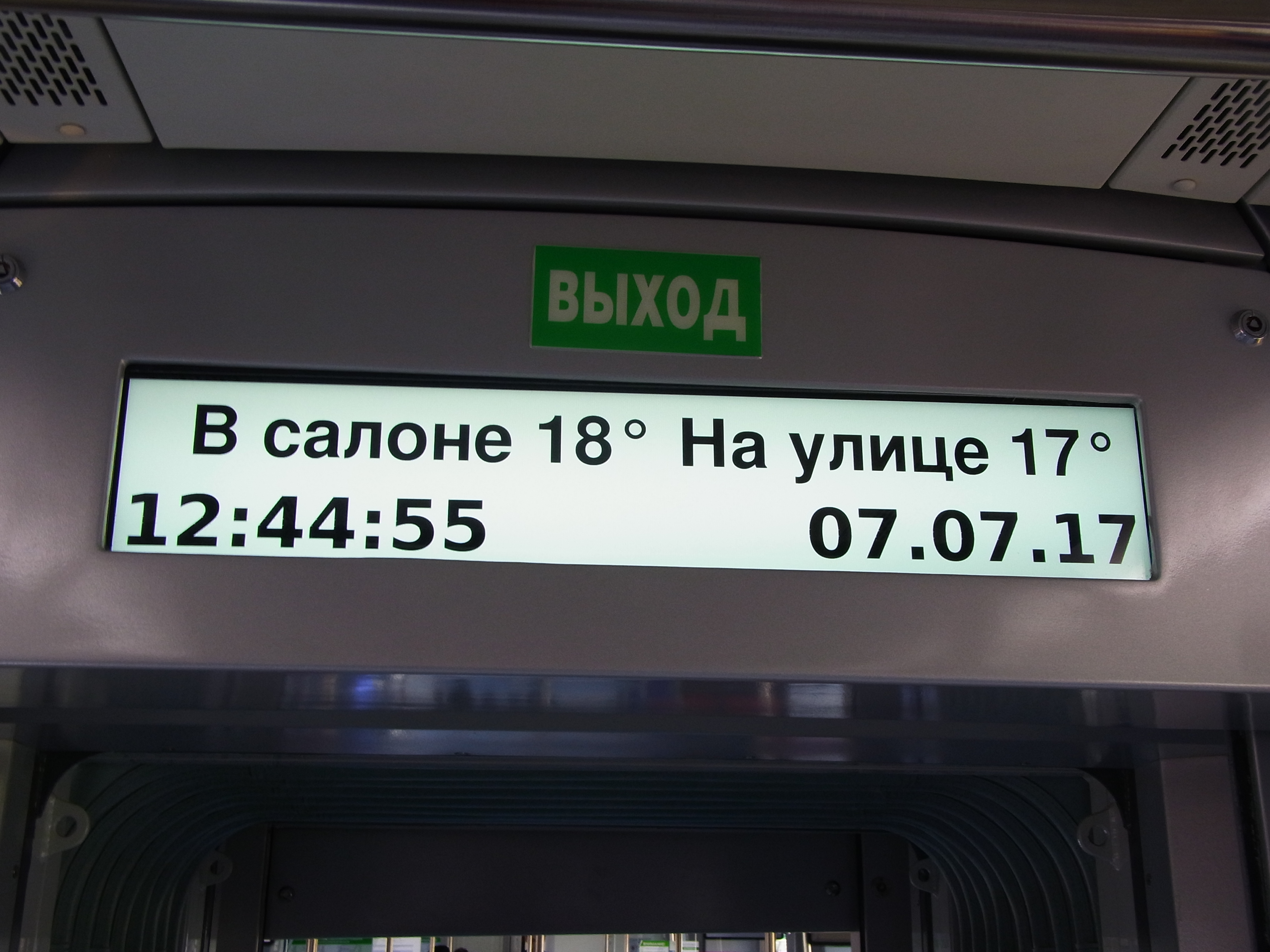 Информационное табло в салоне ЭГ2Тв